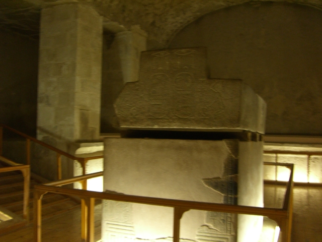 Vue du sarcophage du Pharaon Sethnakht - XXe dynastie - Vallée des Rois